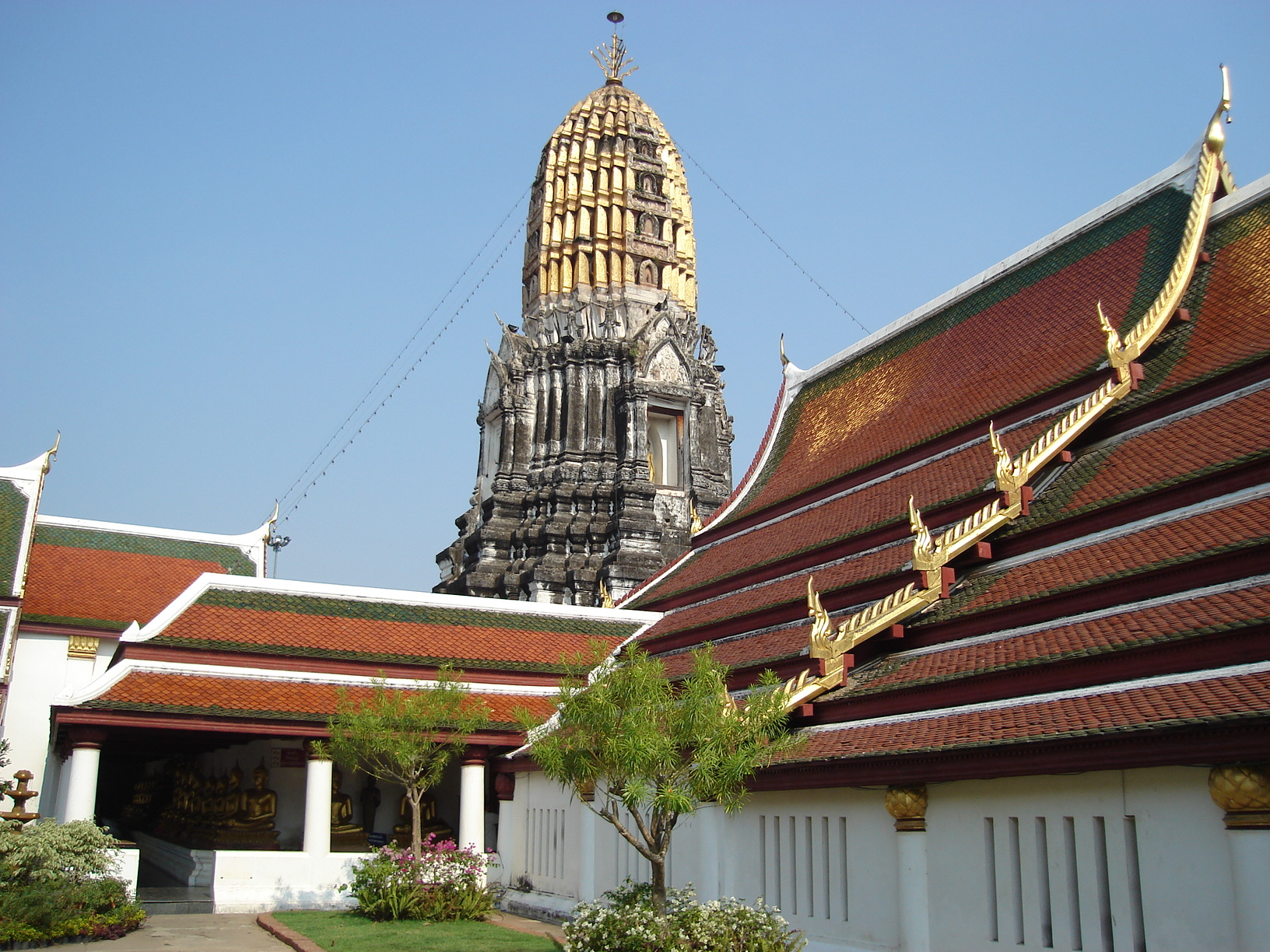 พระปรางค์ประธานและพระวิหารคต วัดพระศรีรัตนมหาธาตุวรมหาวิหาร